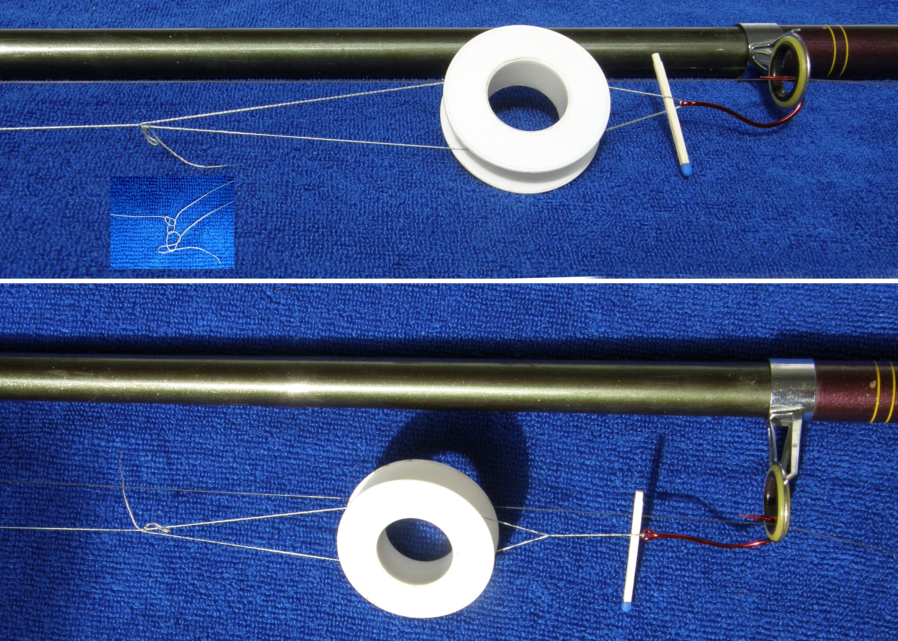 Bimini-Twist-Knoten mit Hilfe einer leeren Spule gewickelt